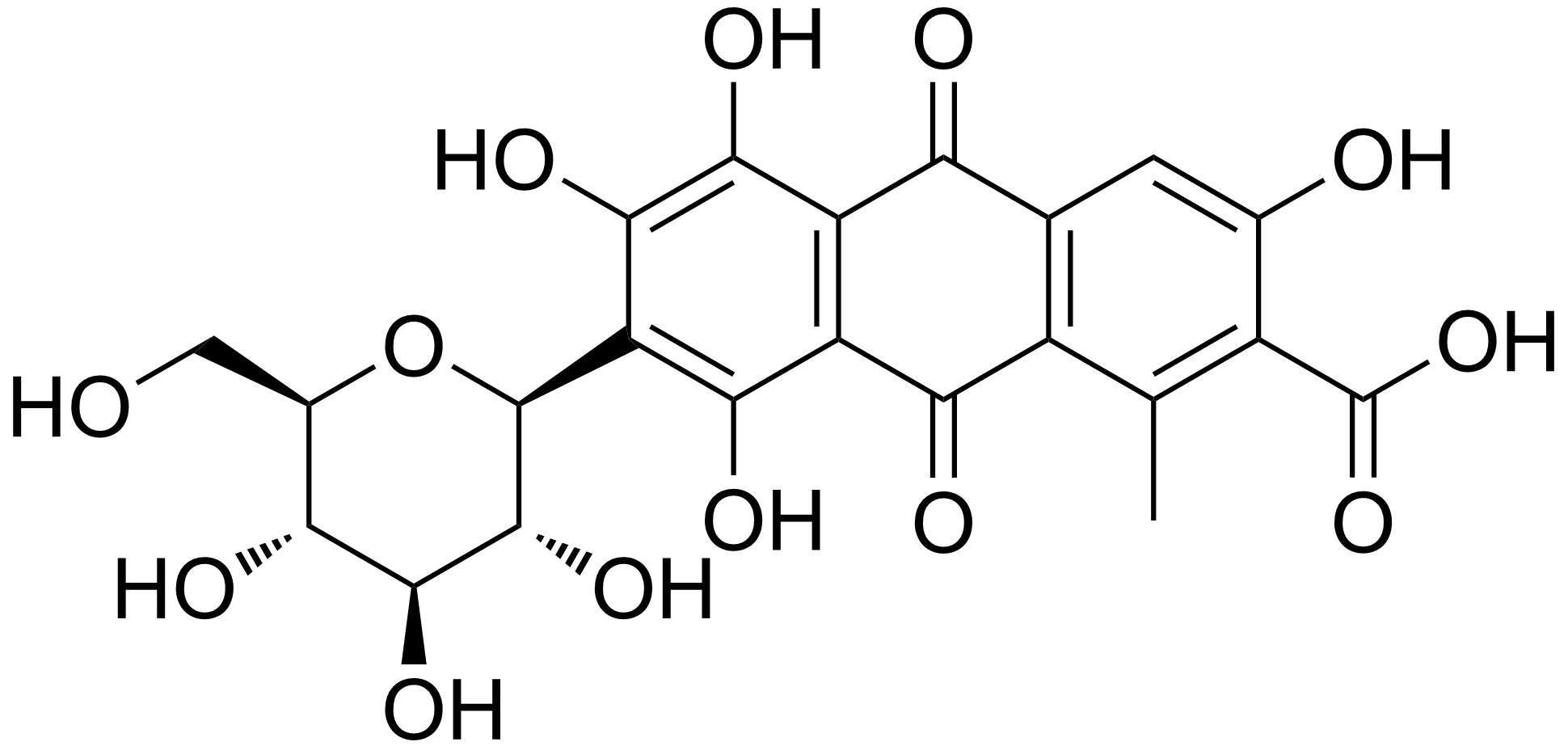 chemical structure of carminic acid